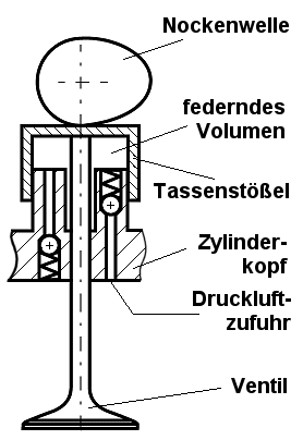 Stark schematisierte Darstellung einer pneumatischen Ventilfeder, wie sie im Rennmotorenbau zunehmend eingesetzt wird